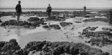 Reproduction du Larousse illustré de 1923 montrant le récif d'Hermelles de la baie du Mont Saint Michel et la présence de gardes du littoral sur ce site jugé néfaste pour la production locale d'huîtres.